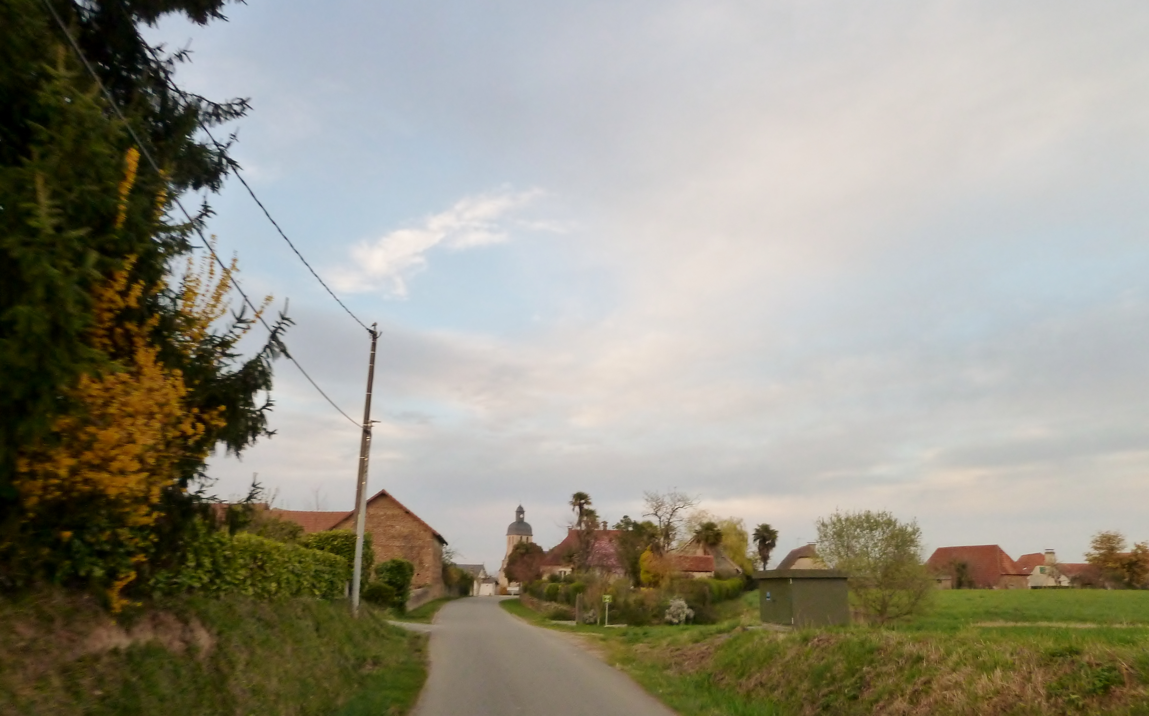 Argelos (Pyrénées-Atlantiques)